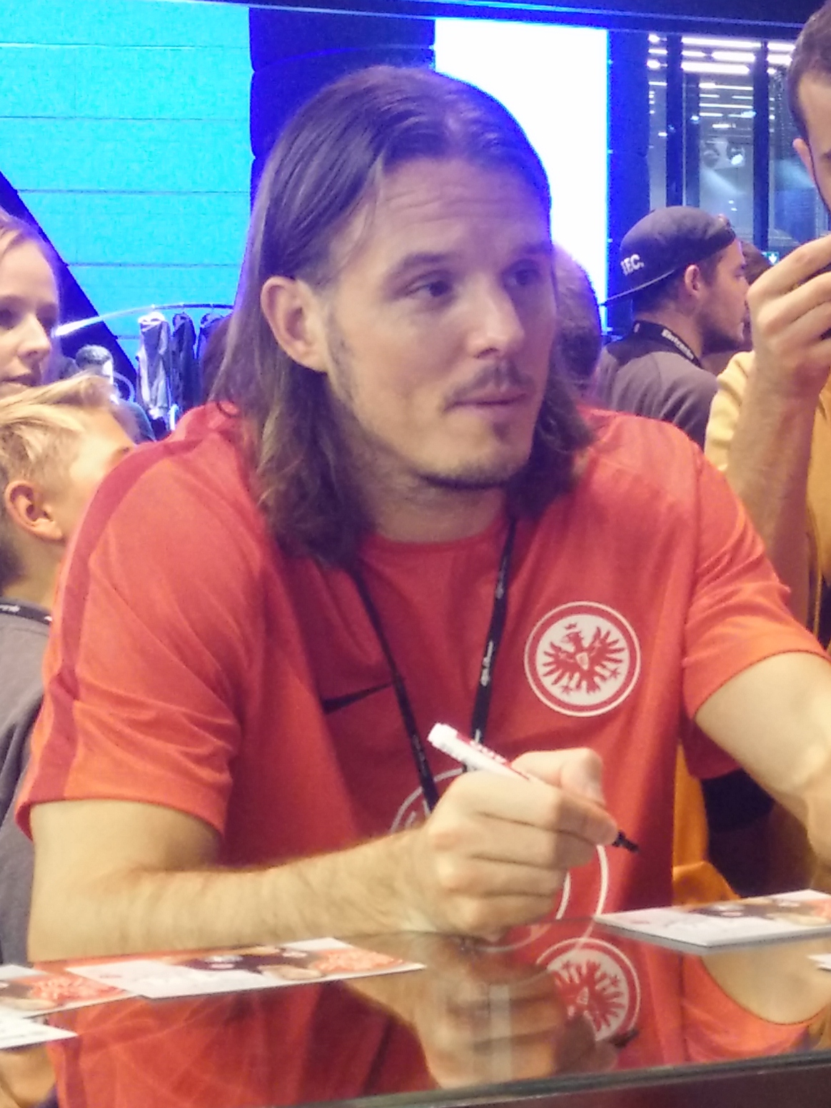 Alexander Meier auf der IAA 2015